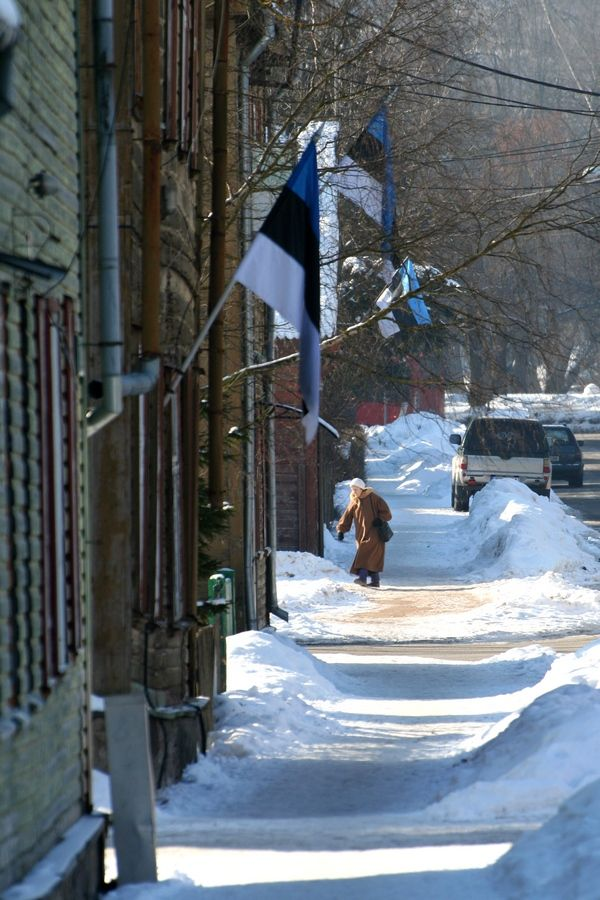 Roosi tänav Eesti Vabariigi aastapäeval 2013